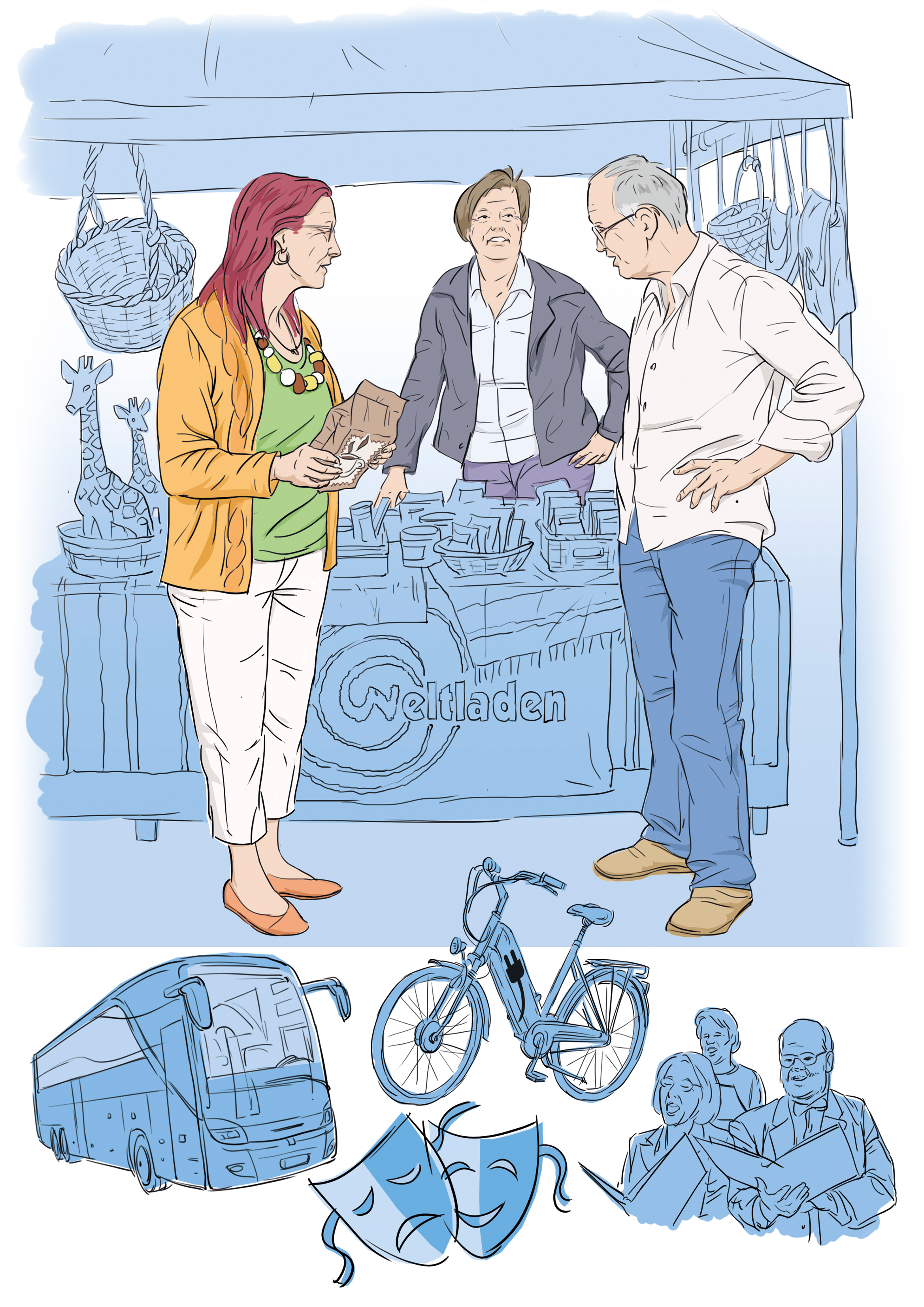 Grafische Darstellung des Typus "Engagierte" aus der ARD-/ZDF-MedienNutzerTypologie. Beispielhafte Aussage: "Das interessiert mich auch."